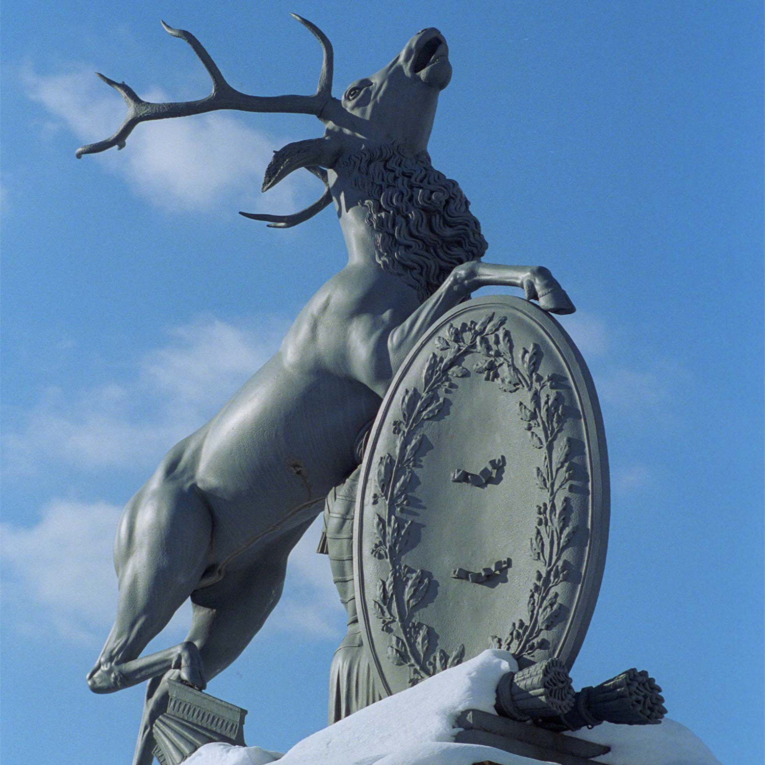 Isopi's Monument "Hart"